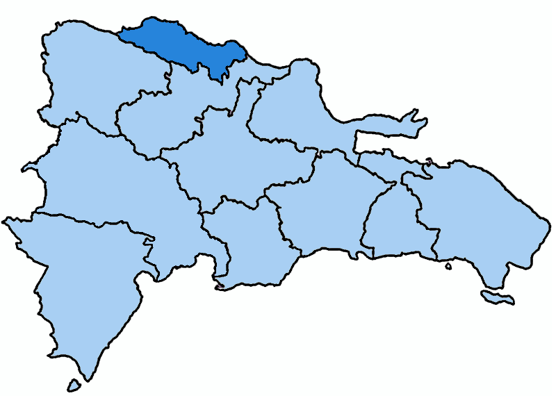 Mappa della diocesi cattolica di Puerto Plata, nella Repubblica Dominicana. Anno 2009.